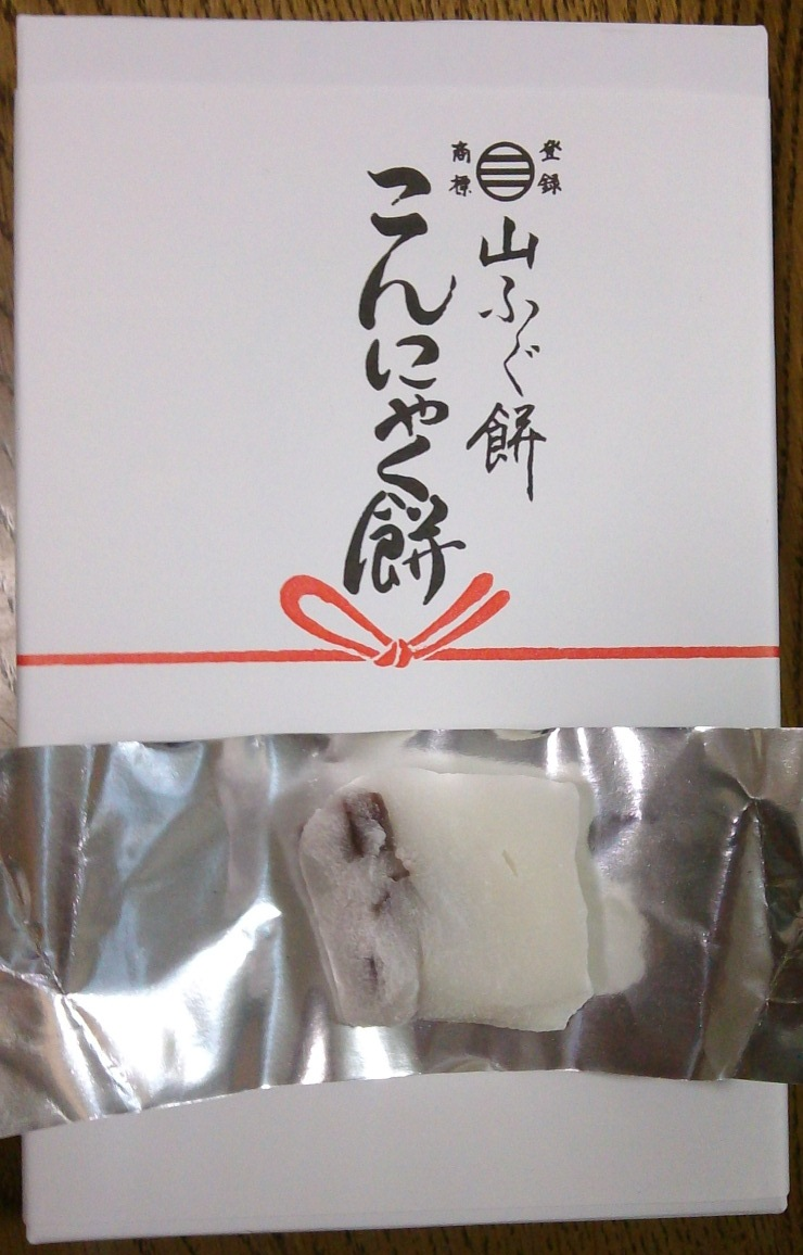 こんにゃく餅の個包装を外すと、中からふわふわの餅菓子に小さく切った羊羹が包み込まれています。独特の触感はおすすめです。ぜひ試してみてください。